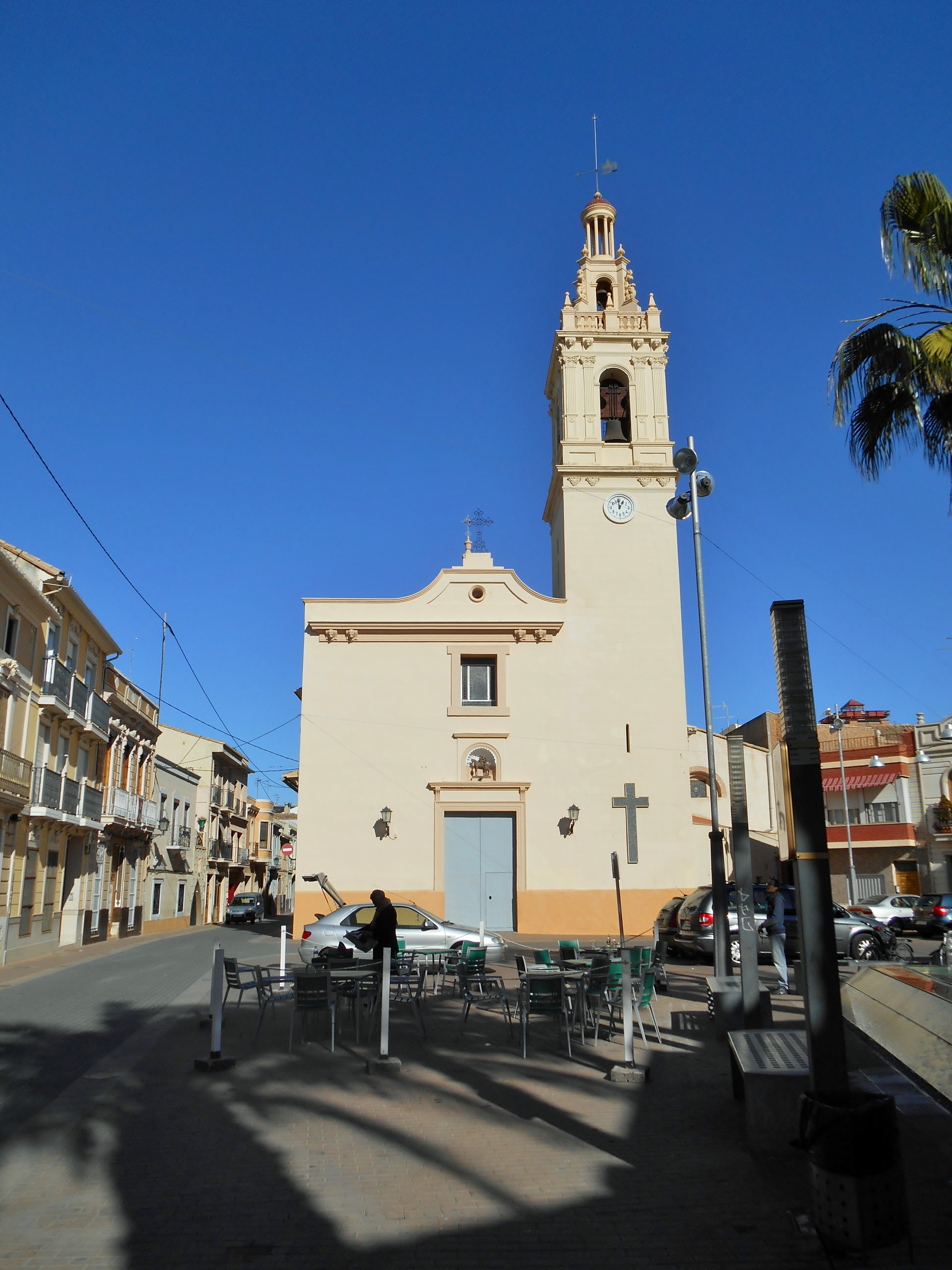 Alcàsser. 16.015-001.